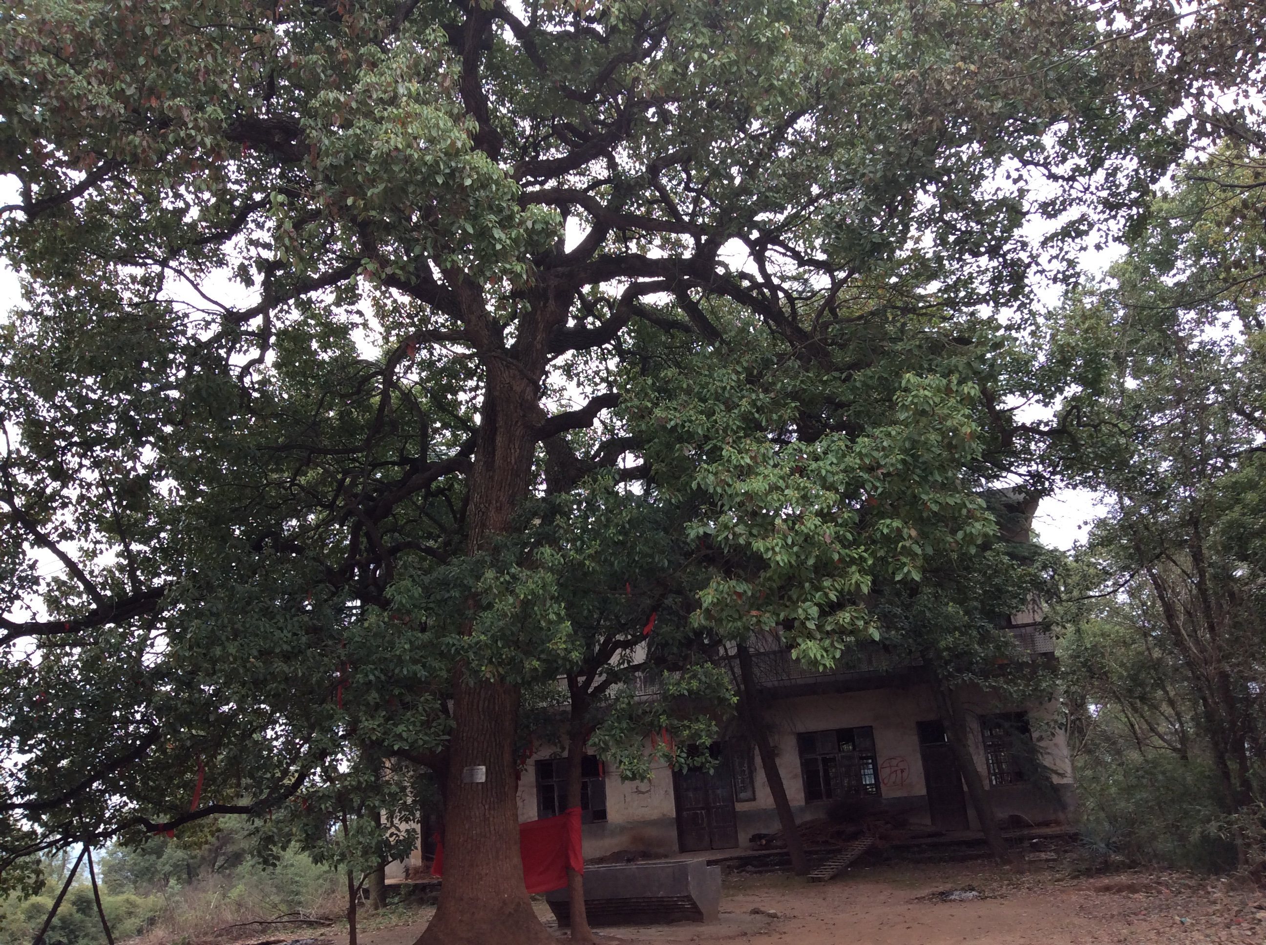 珠晖塔旁的百年香樟树和珠晖旅游商店